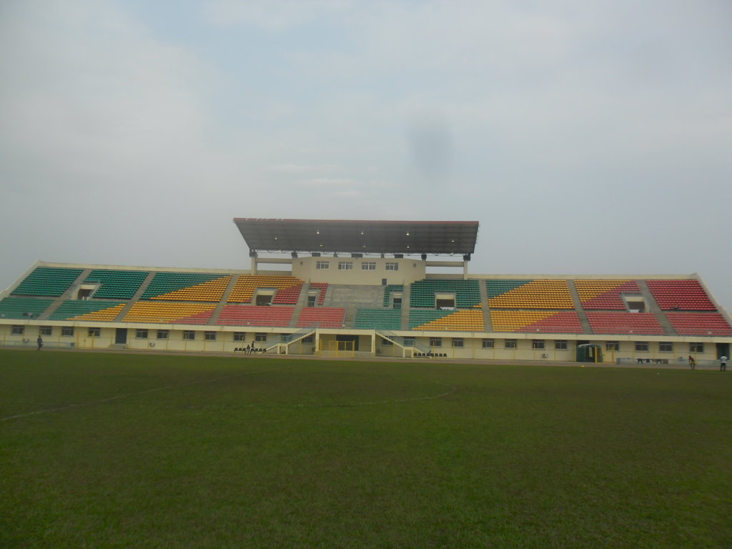 Stade de football d'Owando